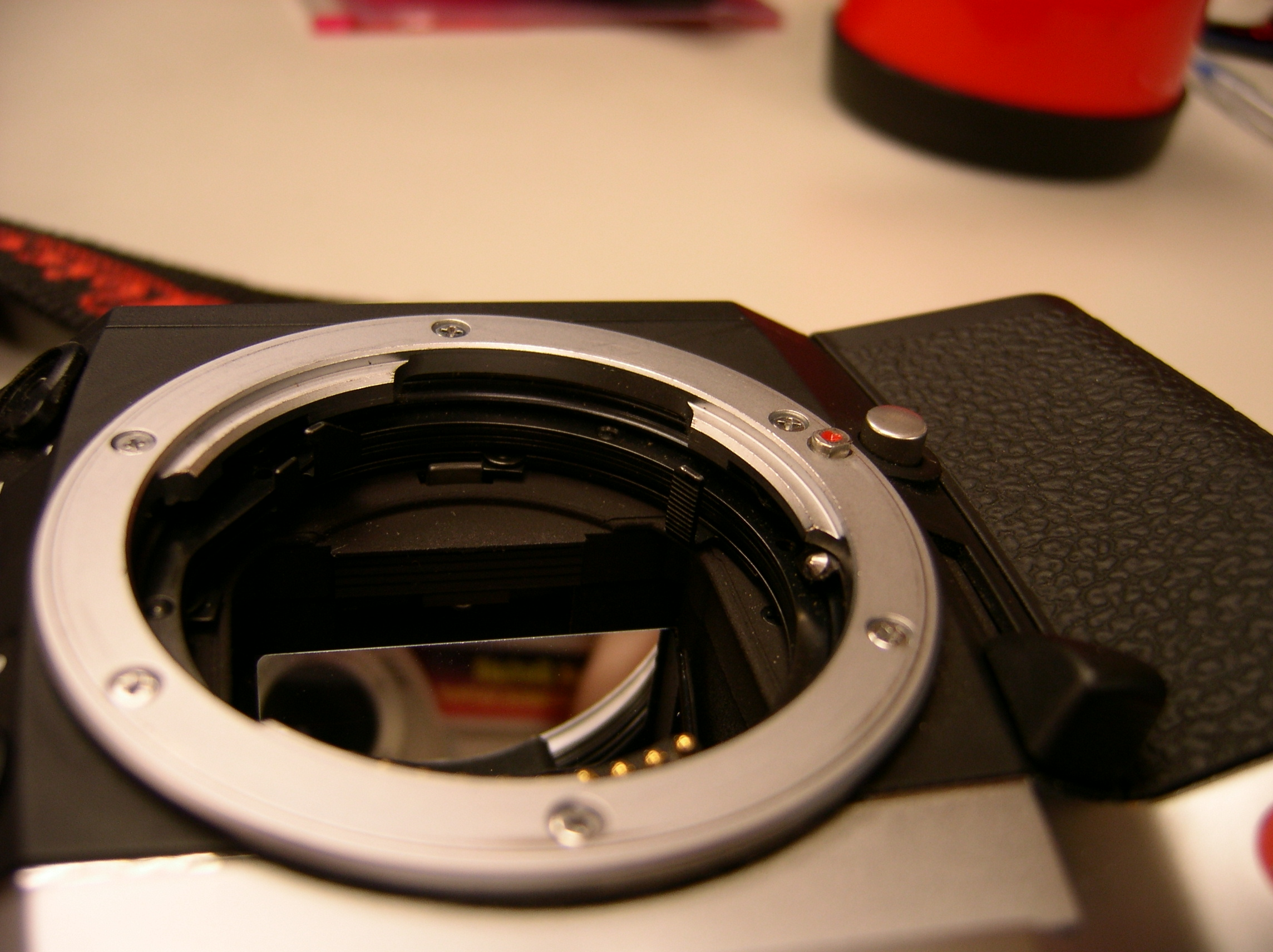 Leica R8 35mm film camera lens mount.